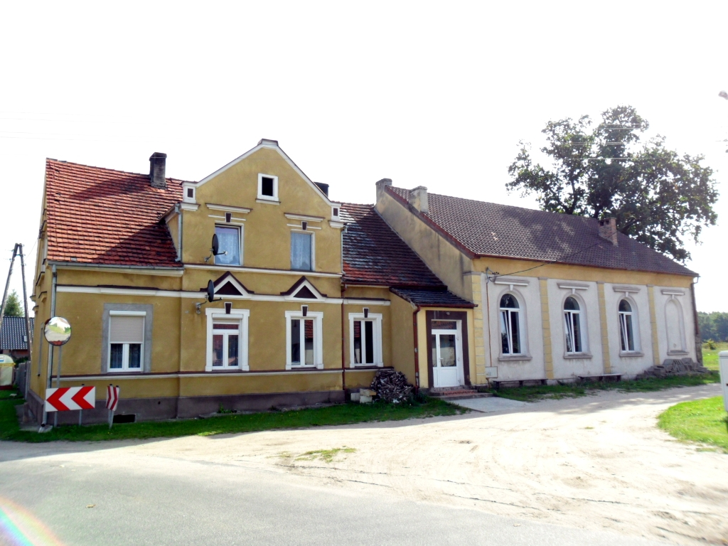 dom, XVIII Drzeńsk Mały, nr 4 01.1964.